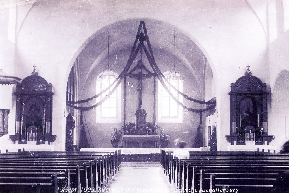 Kapuzinerkirche Aschaffenburg, Ausstattung von 1909 (Historisches Foto vom Tag der Kirchweih, 19. Sept. 1909)